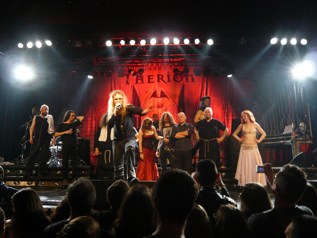 Therion 22/12/07 Elysée Montmatre (Paris)